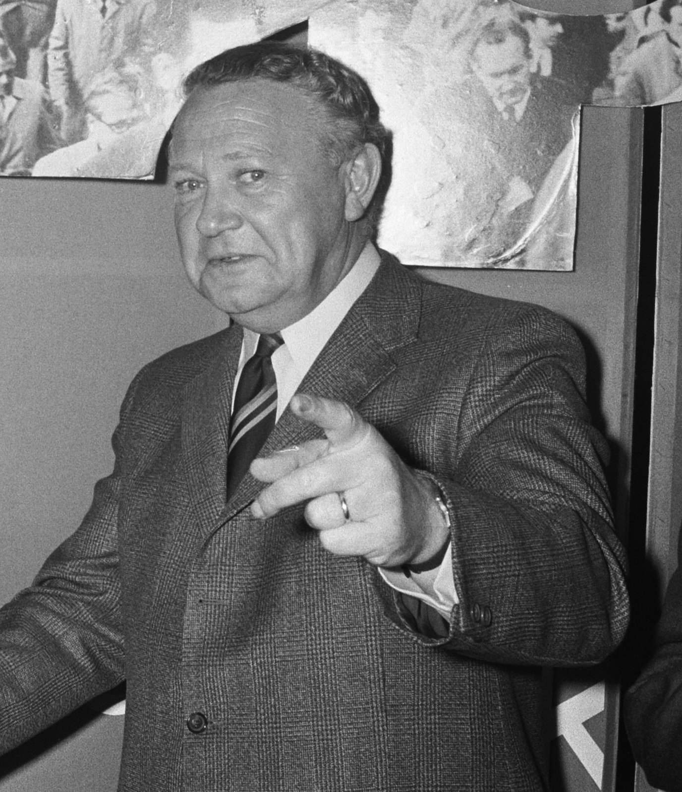 Collectie / Archief : Fotocollectie Anefo Reportage / Serie : [ onbekend ] Beschrijving : KVP partijraad bijeen, Rotterdam, nr. 35 (l) De Zeeuw , (r) Van Laan (TH), nr. 36, 36a L. de Jong (r) De Zee nr. 32a (l) De Zeeuw , (r) Van Laan / Datum : 27 november 1971 Locatie : Rotterdam, Zuid-Holland Trefwoorden : partijraden Persoonsnaam : Jong, Lou de Fotograaf : Peters, Hans / Anefo Auteursrechthebbende : Nationaal Archief Materiaalsoort : Negatief (zwart/wit) Nummer archiefinventaris : bekijk toegang 2.24.01.05 Bestanddeelnummer : 925-1848